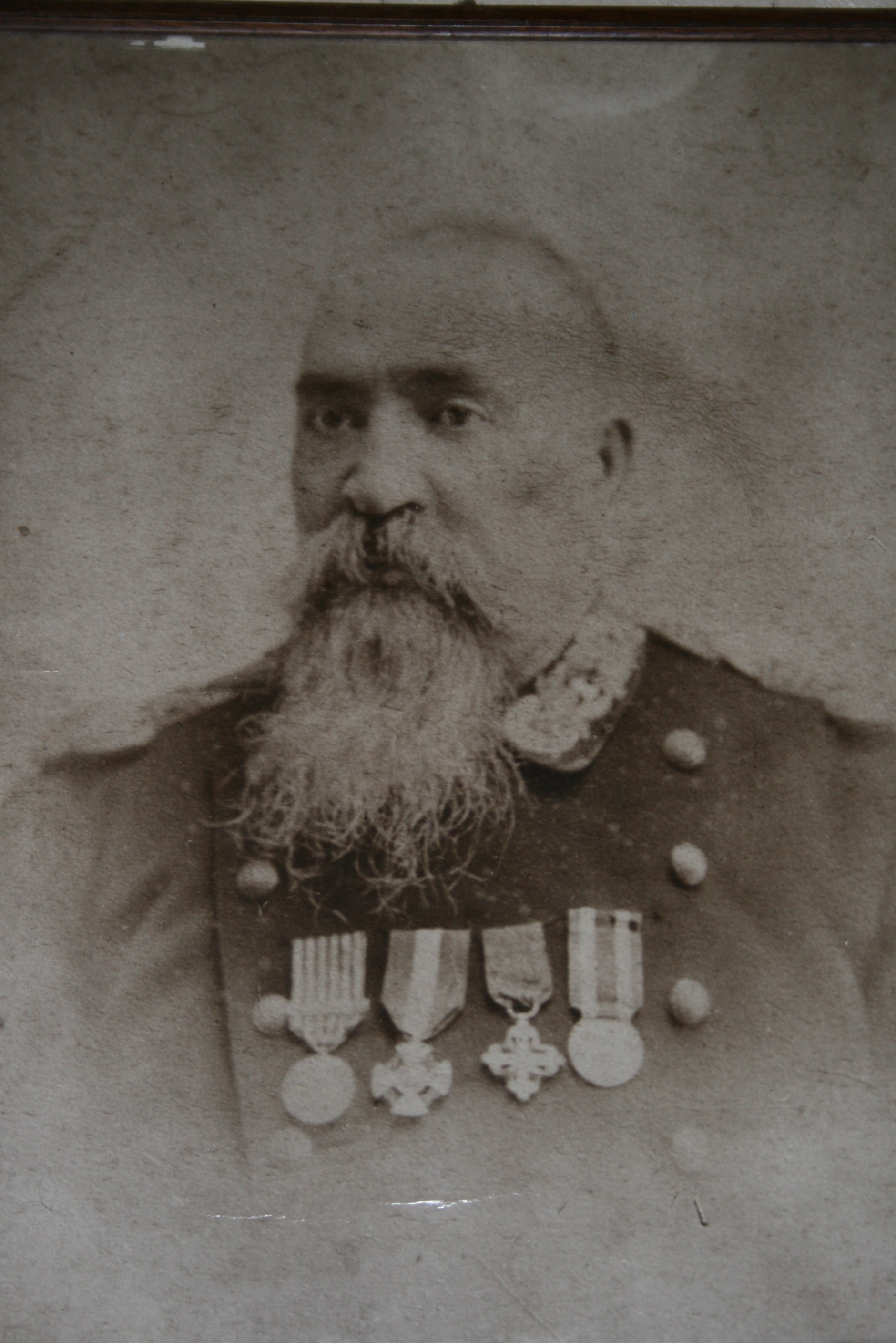 Avvocato Antonio Palermo - Riomaggiore 1832-1905